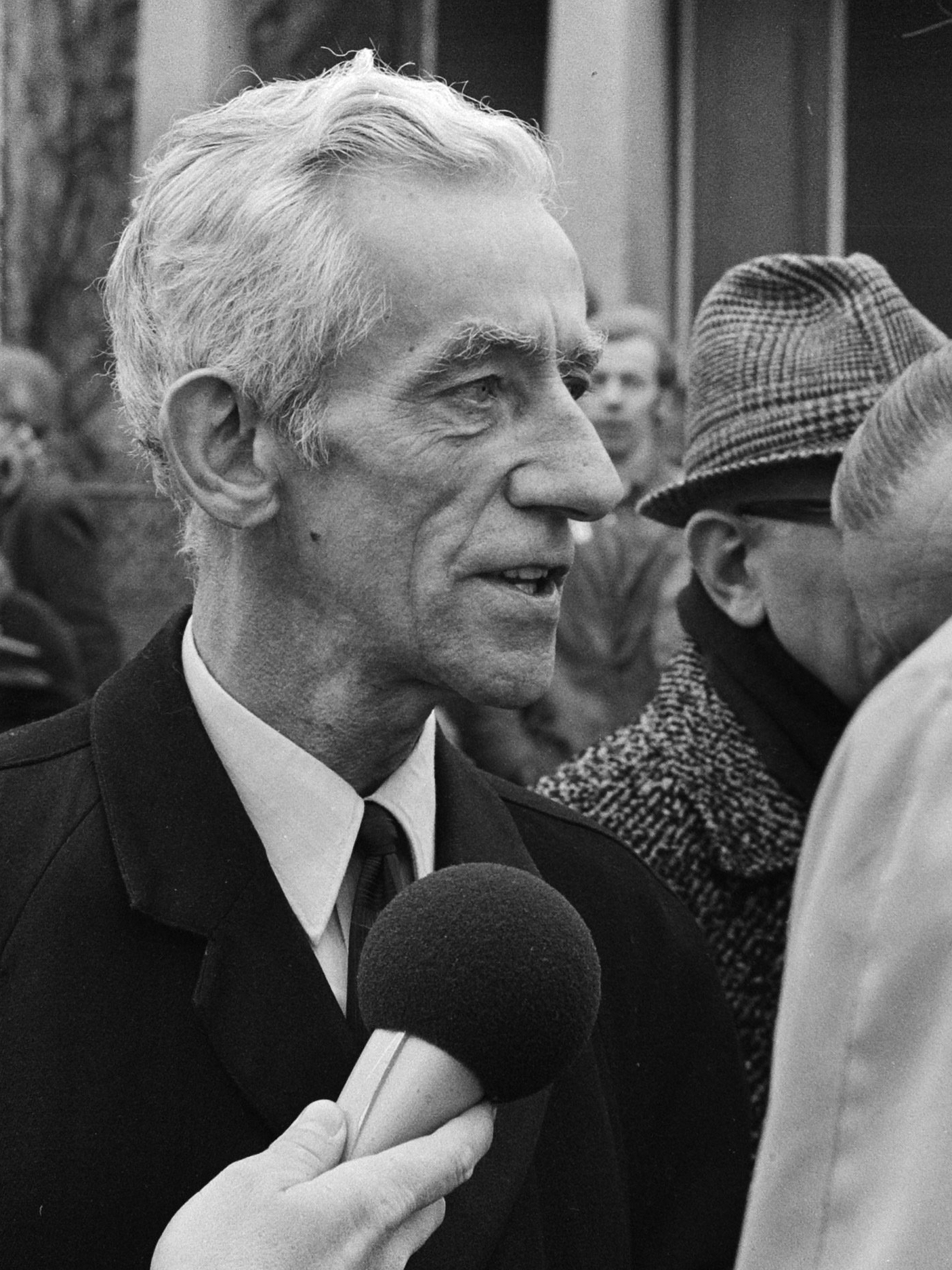 Protest van joodse vrouwenorganisaties bij de Russische ambassade in Den Haag tegen de behandeling van joden in Rusland; Piet Nak 20 april 1971